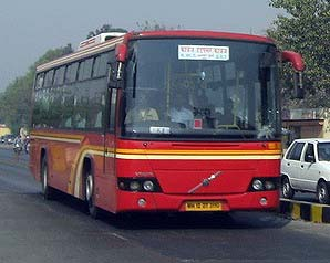 Pune BRTS